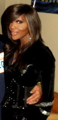 Ex-participante do RuPaul DragRace Coco Montrese.